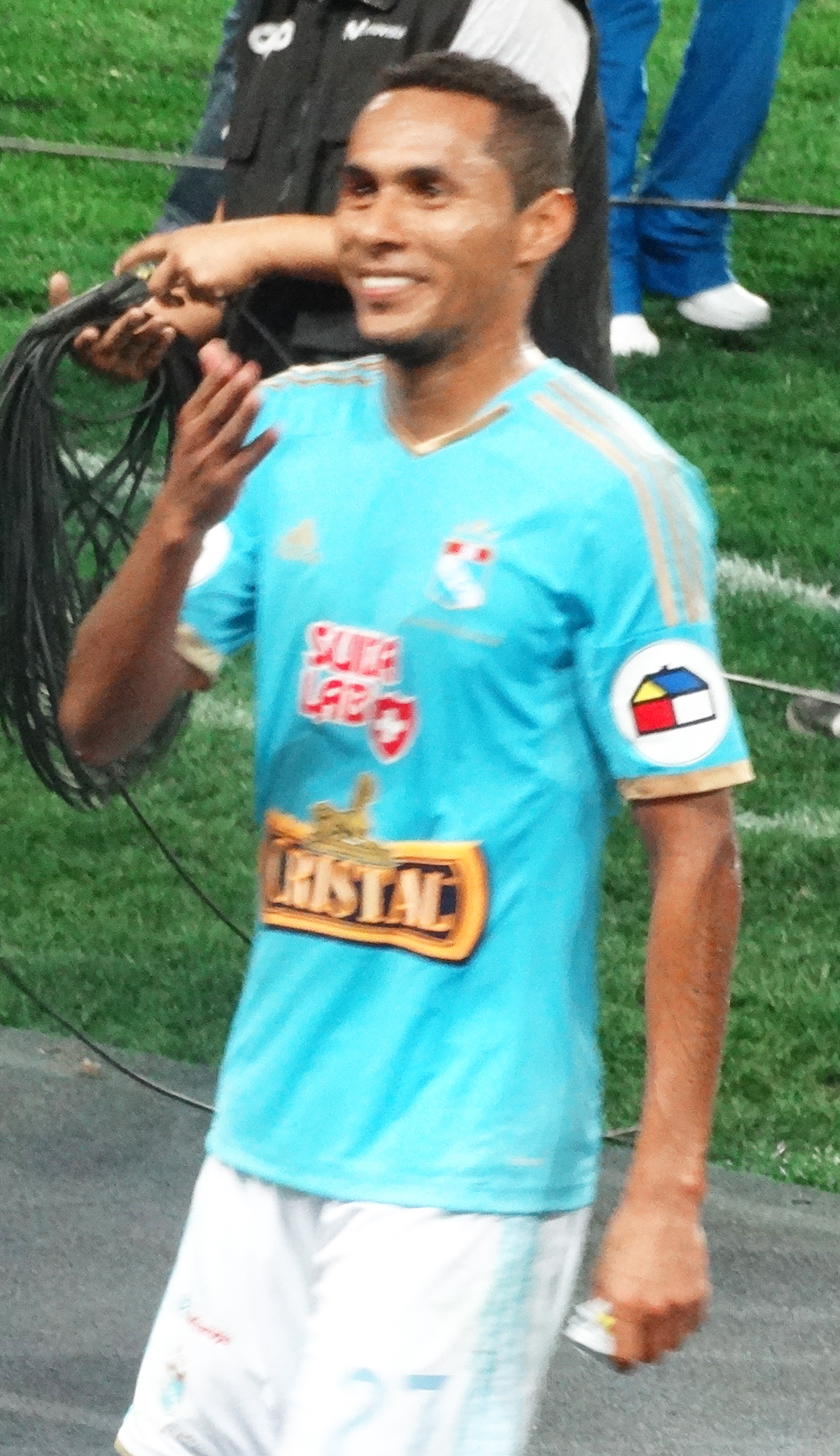 Peruvian footballer Carlos Lobaton iat 2014 Descentralizado play-off